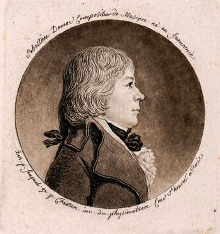 Sebastian Demar, d'après Jean Fouquet. 1795